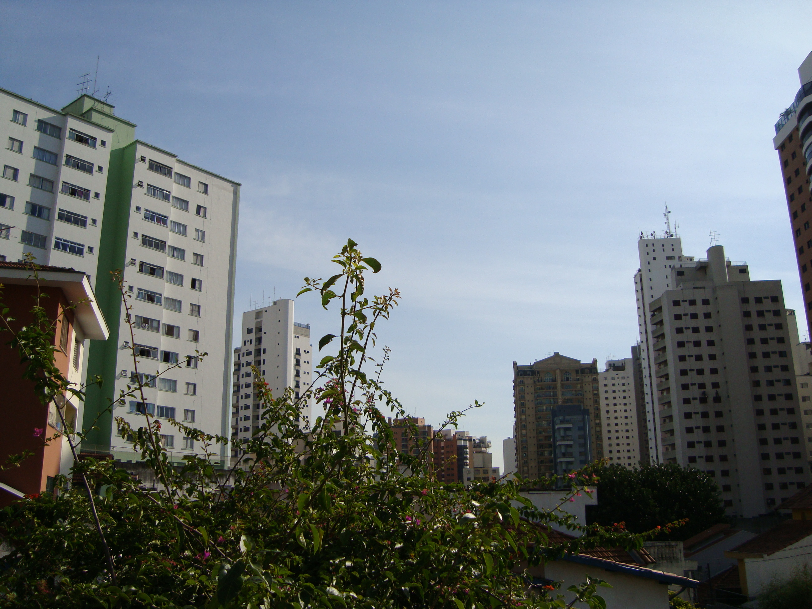 Foto do Alto do Bairro de Santana São Paulo/SP